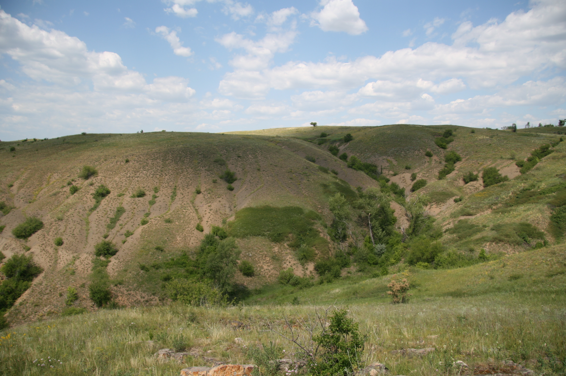 Волнухинський заказник, Лутугинський район